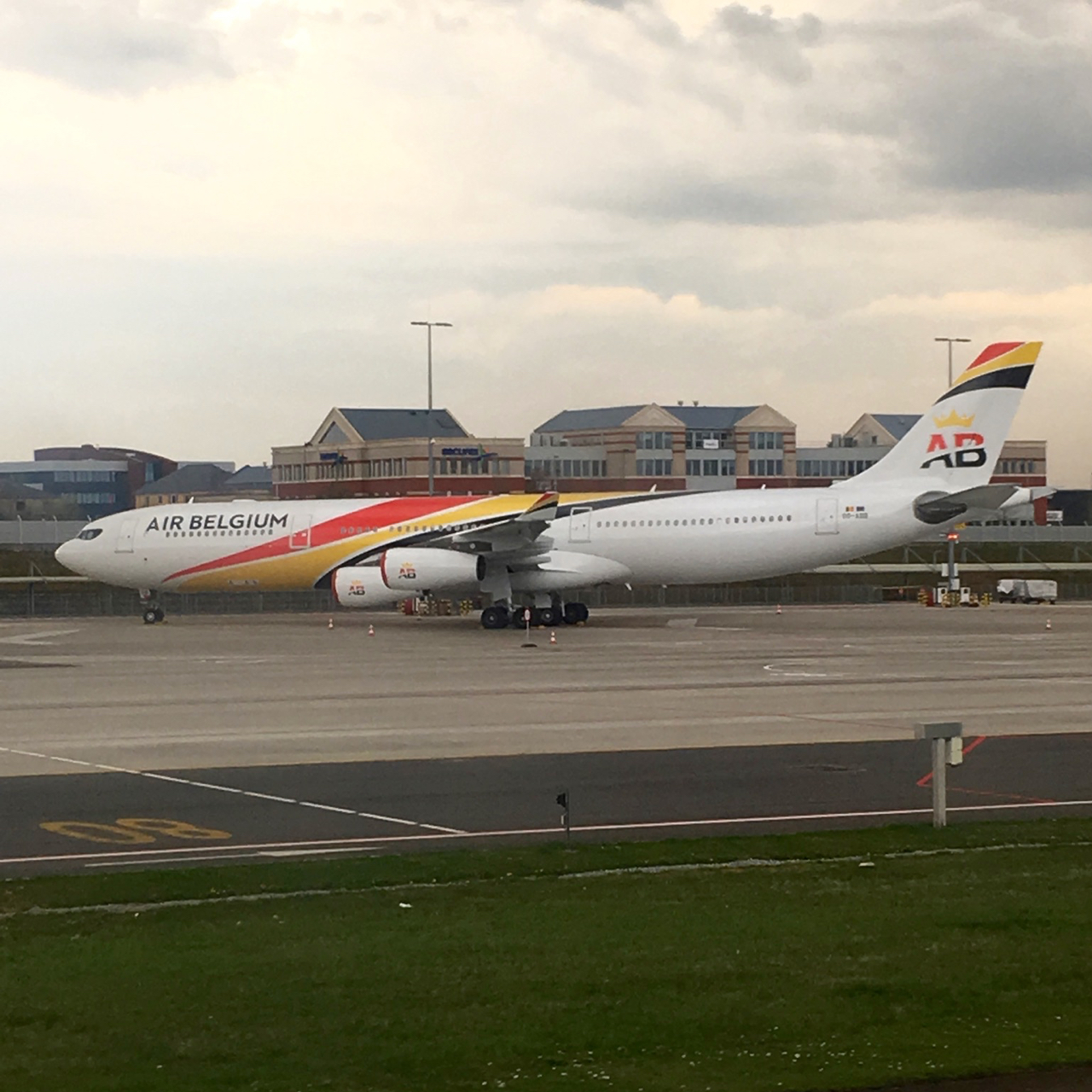 Avion (OO-ABB) d'Air Belgium, stationné sur le tarmac de l'aéroport de Charleroi Bruxelles Sud.